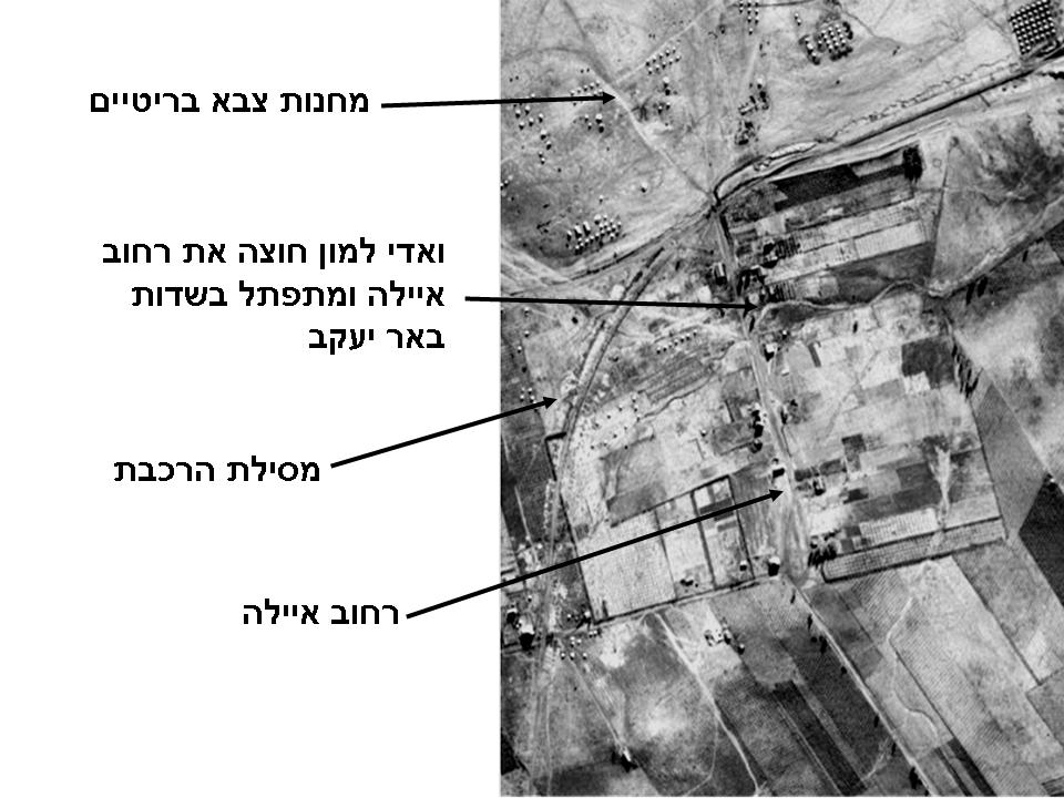 ראשית באר יעקב